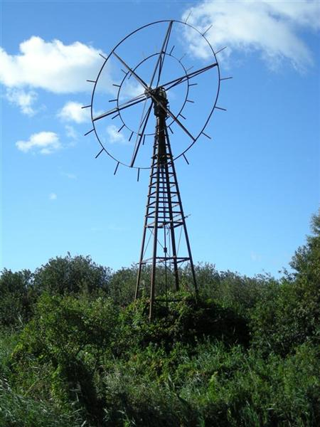 Windmotor bij Oldeouwer, is gesloopt